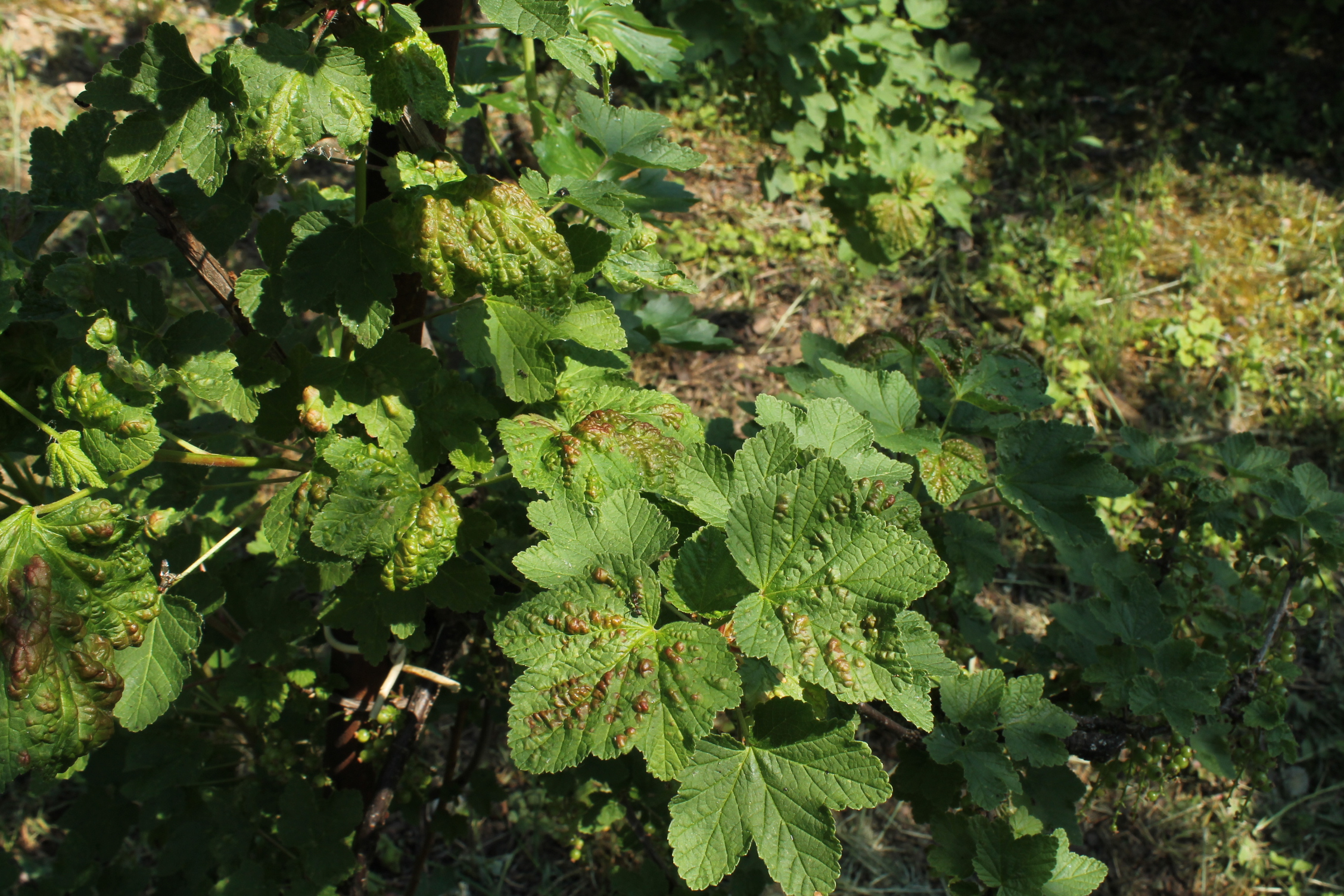 Mšice rybízová Cryptomyzus ribis na rybízu (symptomy), Brno Komín